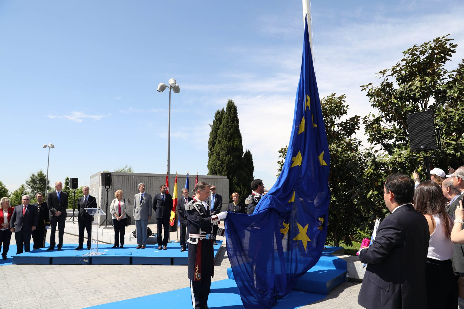 La alcaldesa de Madrid, Manuela Carmena, ha intervenido en la celebración del Día de Europa, que se conmemora cada 9 de mayo en la Unión Europea en recuerdo a la denominada declaración Schuman, en la que el ministro francés de Exteriores, Robert Schuman, dio en 1950 el primer paso para la integración de los Estados europeos. Hace 60 años fue firmado el Tratado de Roma en el que se sentaban las bases de la UE, que es la efeméride que hoy se recuerda. En el acto de hoy han participado también Eugenio Nasarre, presidente del Consejo Federal del Movimiento Europeo; Jürgen Foecking, representante de la Comisión Europea en España; Kurt Vella-Fondé, primer secretario y cónsul de la Embajada de Malta; José Pascual Marco, director general de Asuntos Generales de la UE del Ministerio de Asuntos Exteriores y de Cooperación; Ignacio Salafranca, eurodiputado y vicepresidente del Movimiento Europeo de España, y la alcaldesa de Madrid.